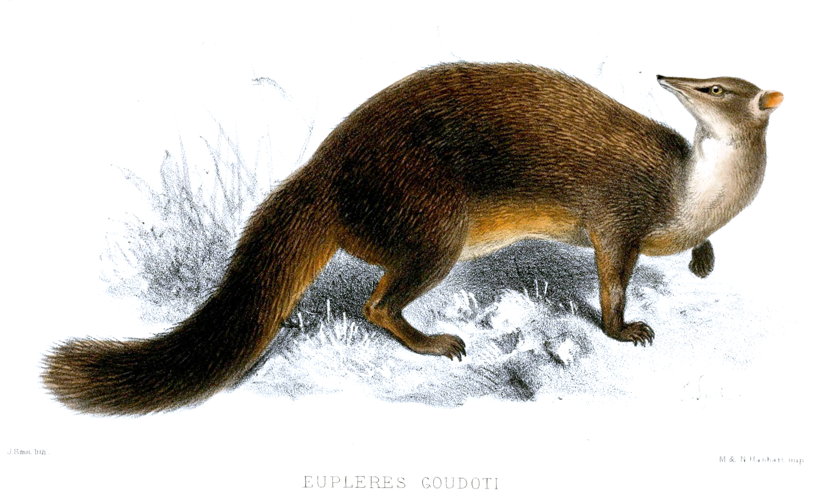 Eupleres goudoti